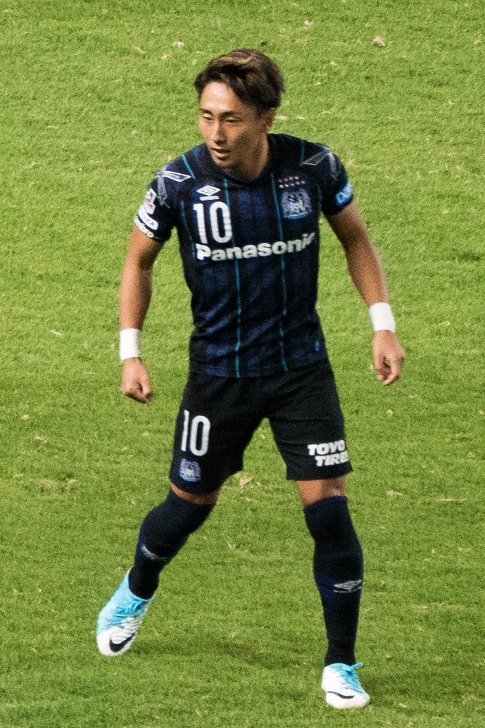 明治安田生命J1リーグ【2017シーズン17第25節】G大阪vs神戸-24.jpg